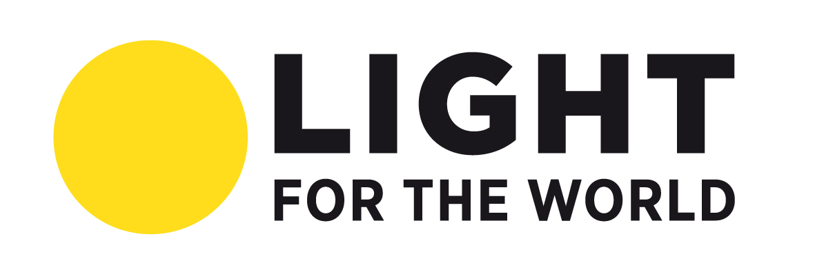 Logo von LIGHT FOR THE WORLD